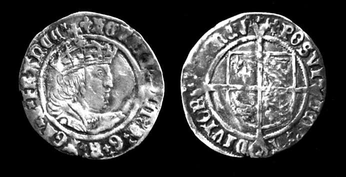 Moeda de prata do reinado de Henrique VIII de Inglaterra